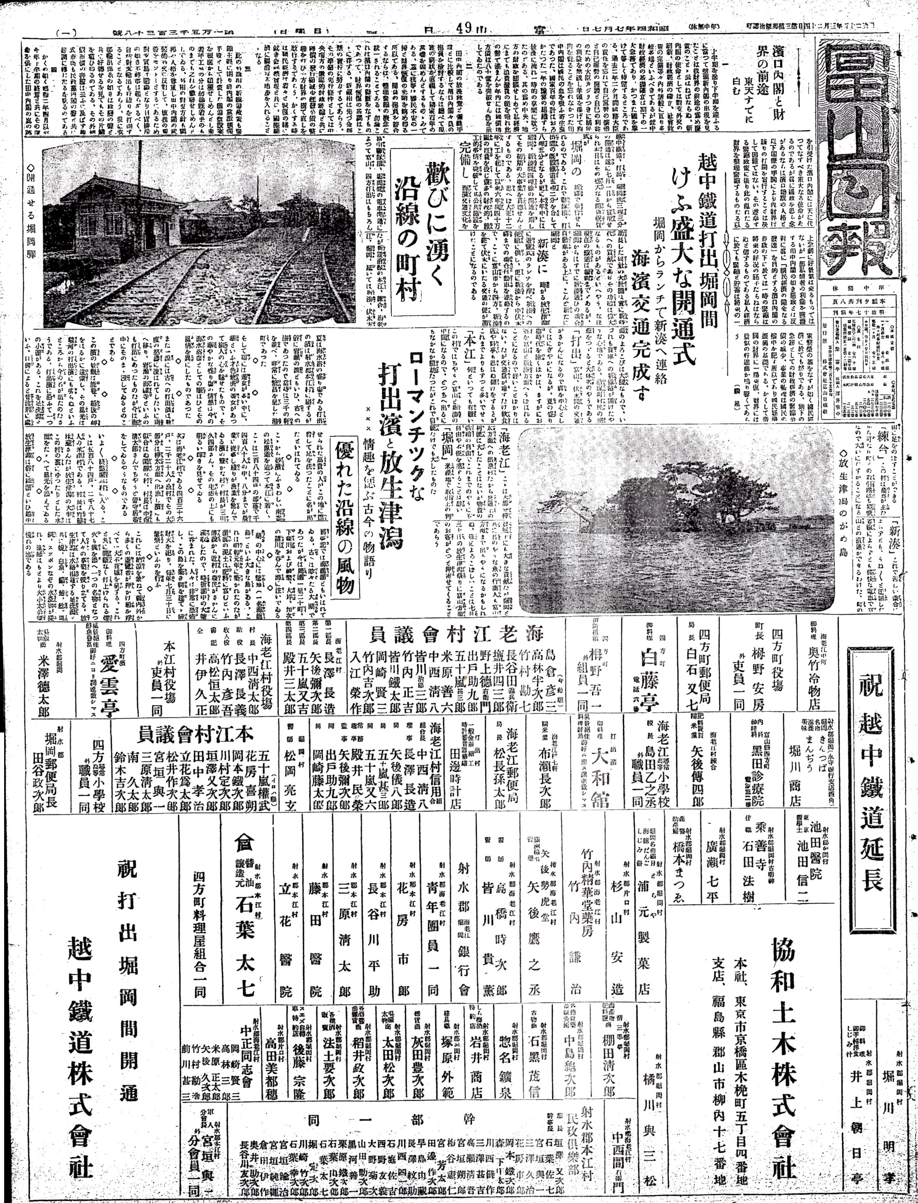 越中鉄道打出、堀岡間けふ盛大な開通式